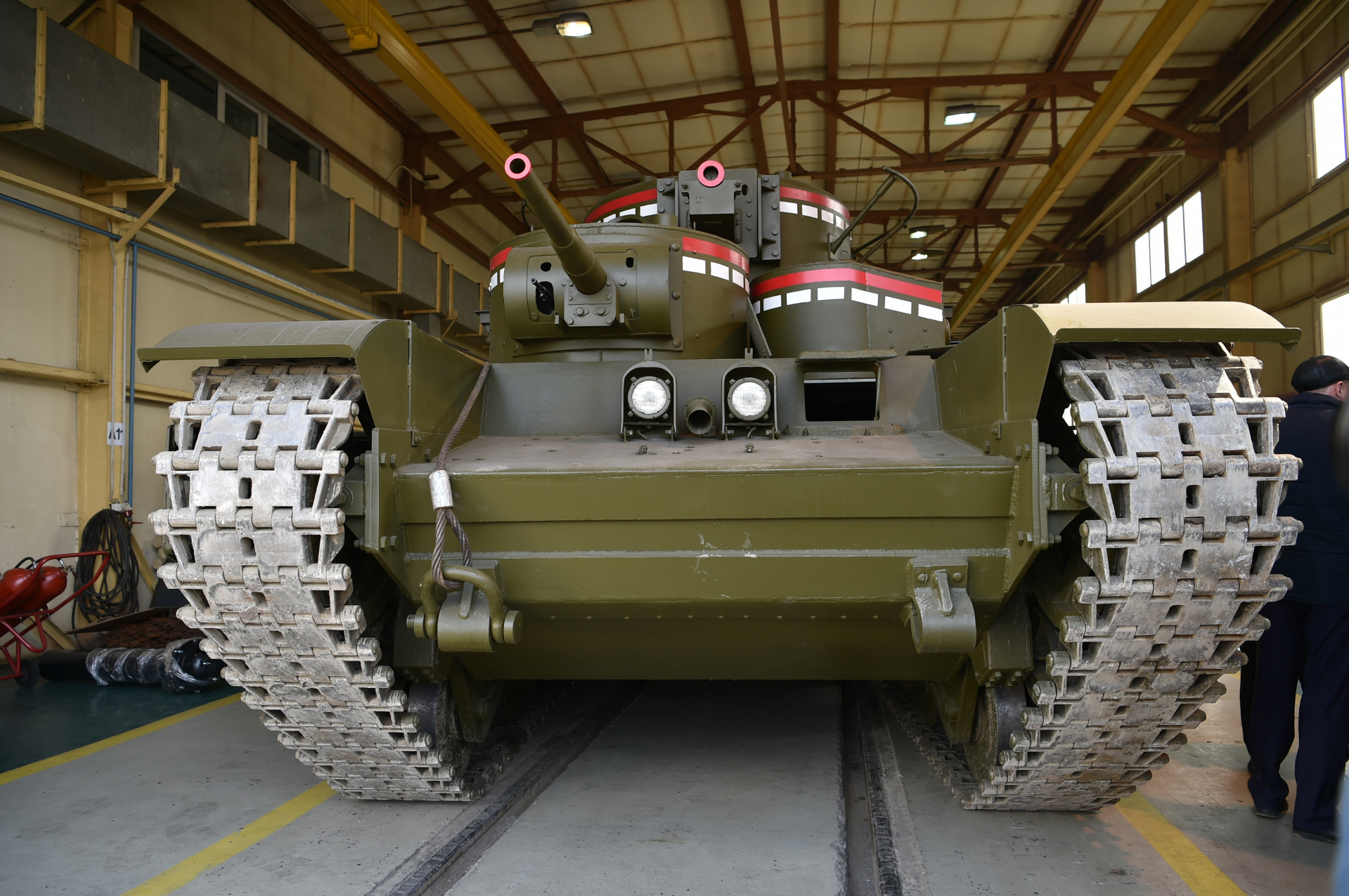 Ходовой макет Т-35 выезжает из цеха реставрации